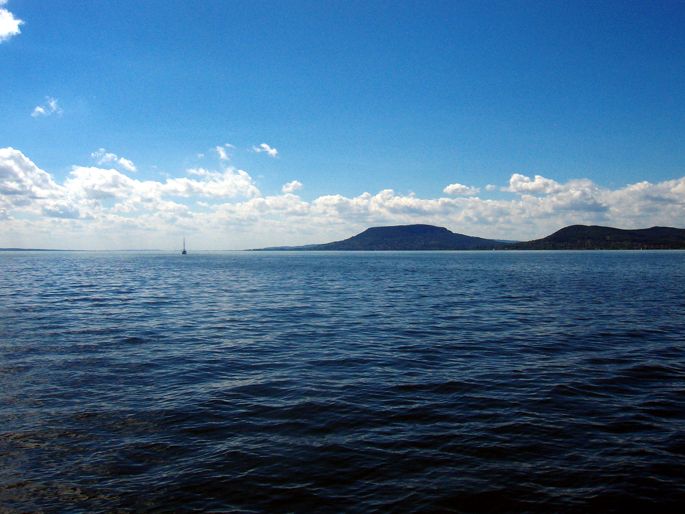 Badacsony vom Seegelboot aus